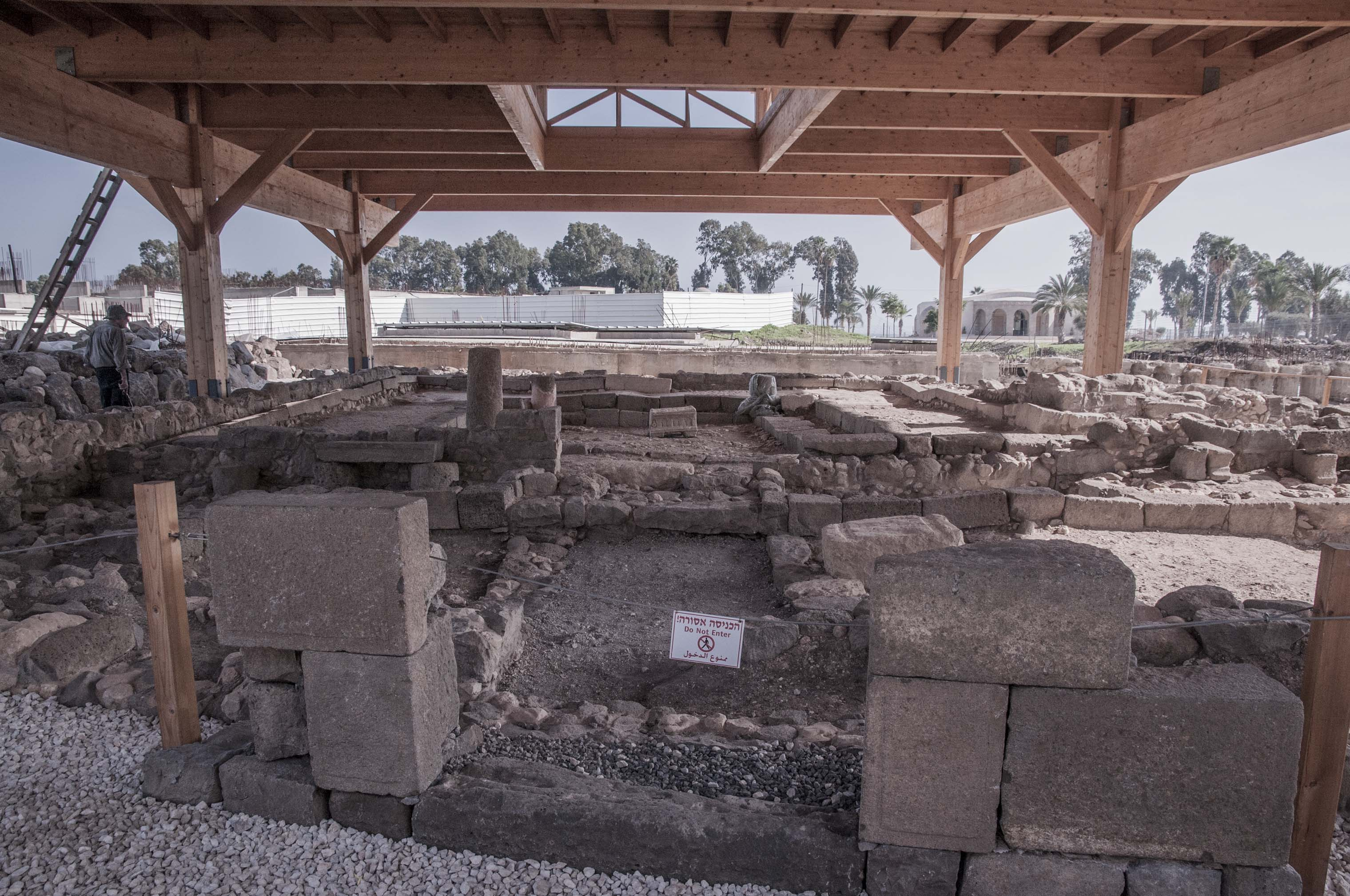 עיר קדומה בגליל, ששכנה לחוף הכנרת, בדרום בקעת גינוסר, סמוך ליישוב מגדל של היום המשמר את שמה. עד להקמת העיר טבריה בשנת 20 לספירה, הייתה מגדלא המרכז העירוני היחיד בחוף המערבי של הכנרת.